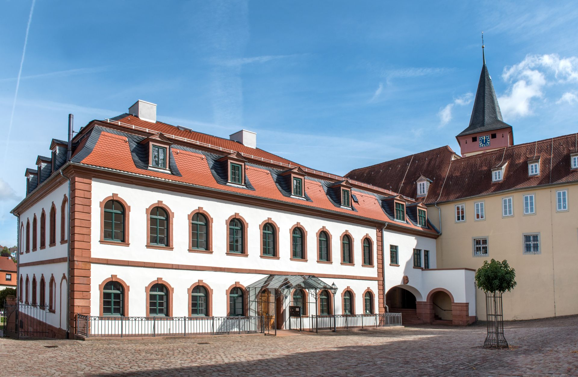 Neues Schloss Ansicht Hofseite, nach Sanierung